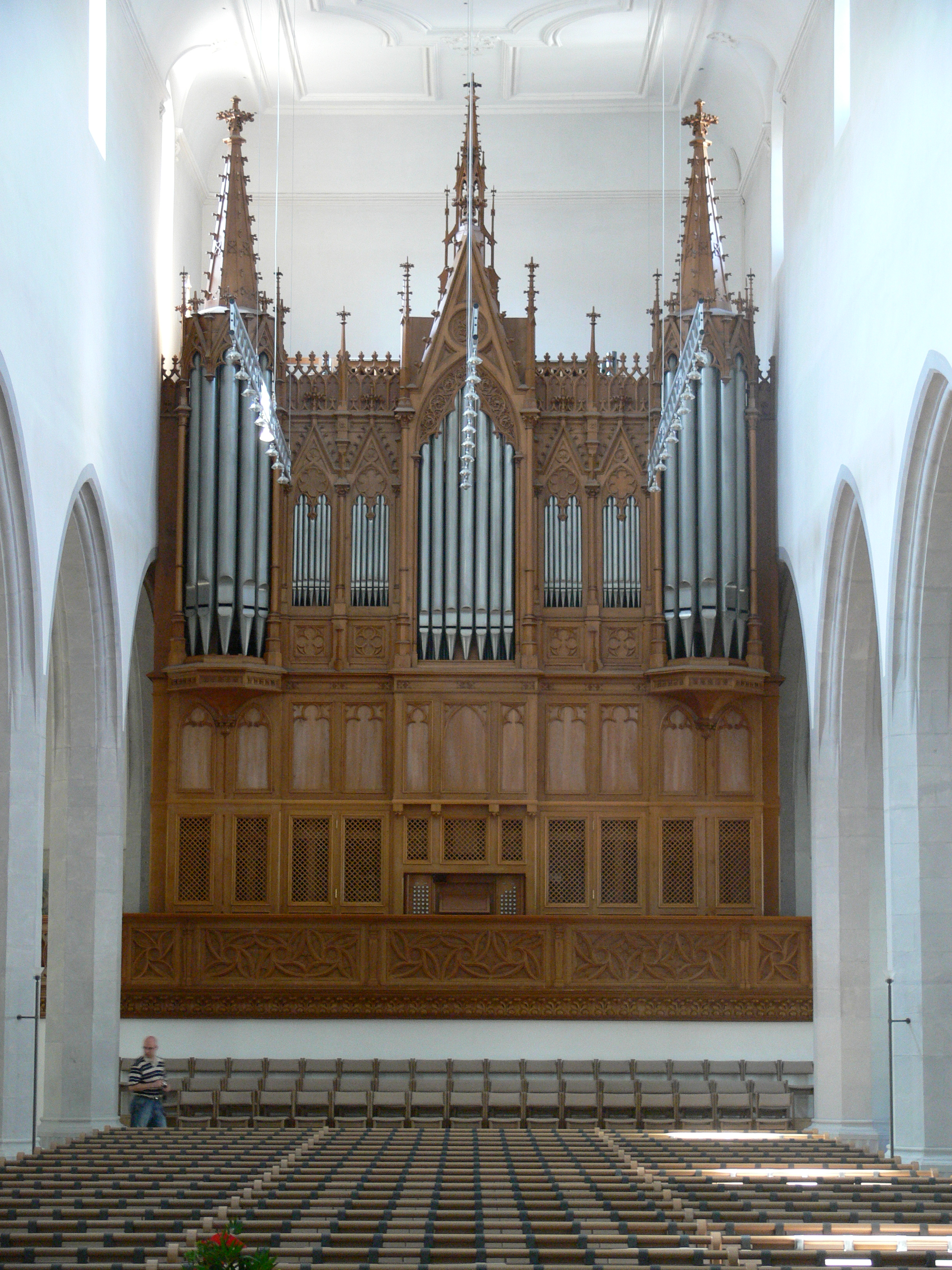 Kirche St. Johann, Schaffhausen Orge von Johann Nepomuk Kuhn, 1879 (neuogtisches Gehäuse von Franz und August Müller)